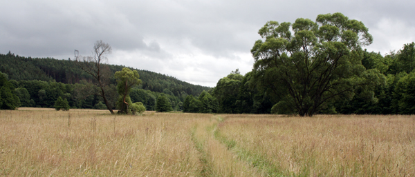 Údolí Úterského potoka nedaleko ústí Dolského potoka, Plzeňský kraj, Česká republika